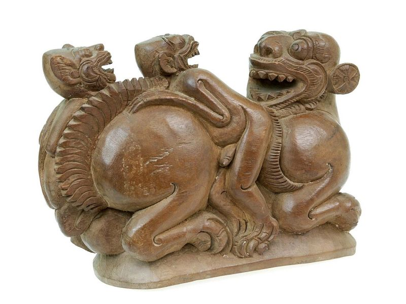 Beeld. Houten beeld van een liggende tijger met over hem heen kruipende kleine apen